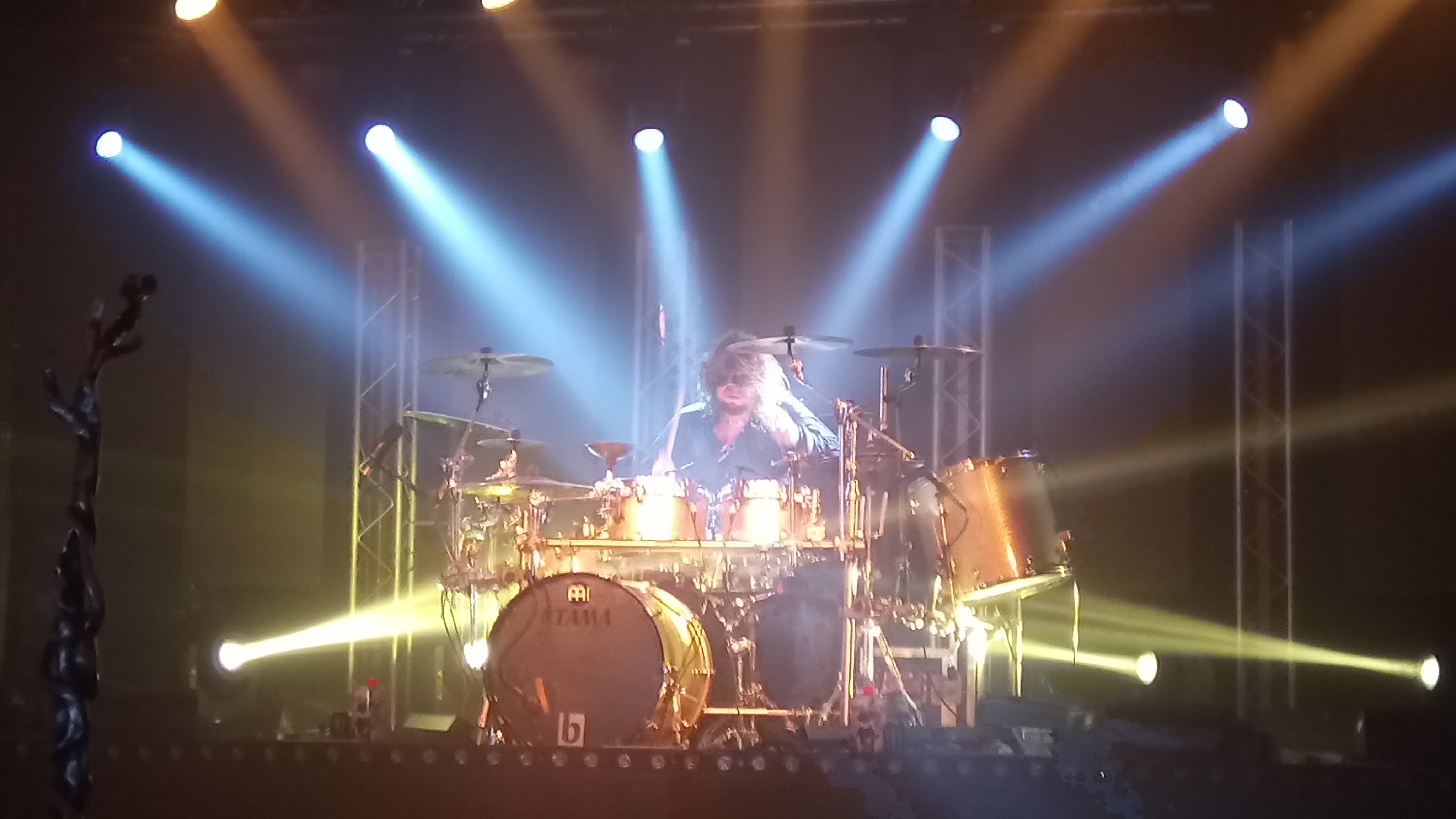 Miloš Meier s kapelou Dymytry v Zábřehu během Svijany Tour 2017